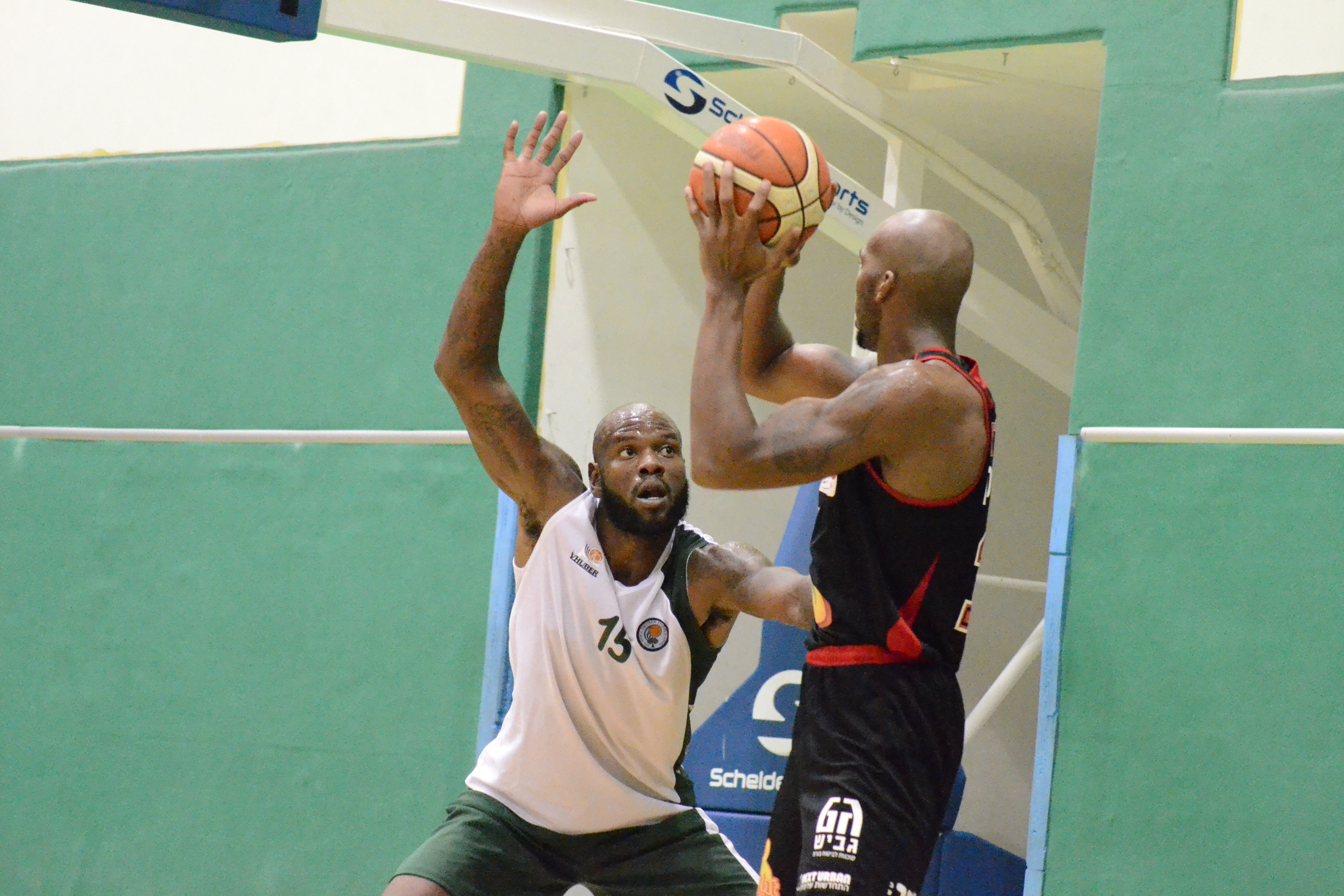 שחקן הפועל כפר סבא דאליס ג'וניור (בלבן) במסגרת הליגה הלאומית 2017